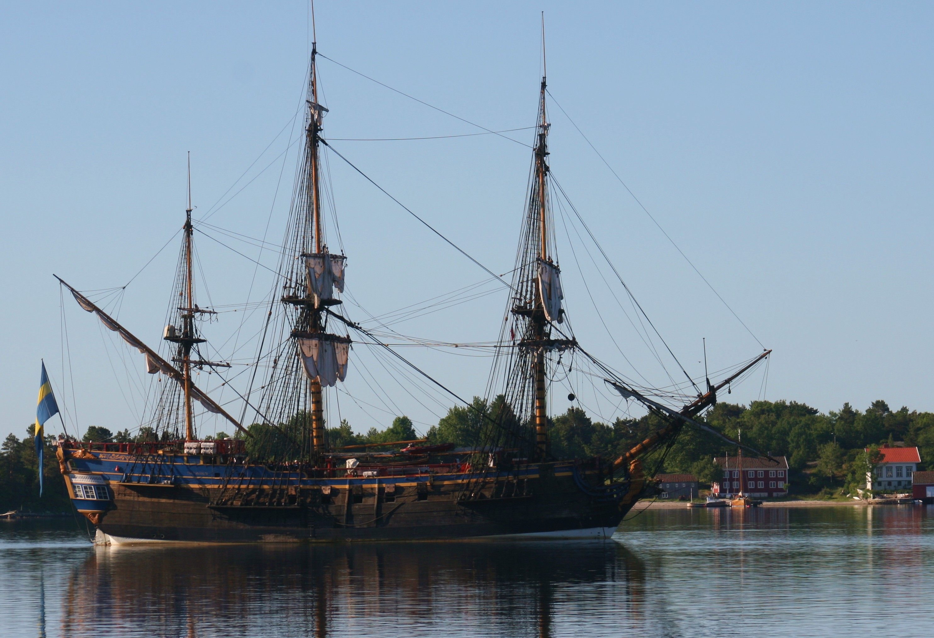 Skipet Götheborg på Merdø havn i Arendal i Norge. Merdøgaard Museum i bakgrunnen.